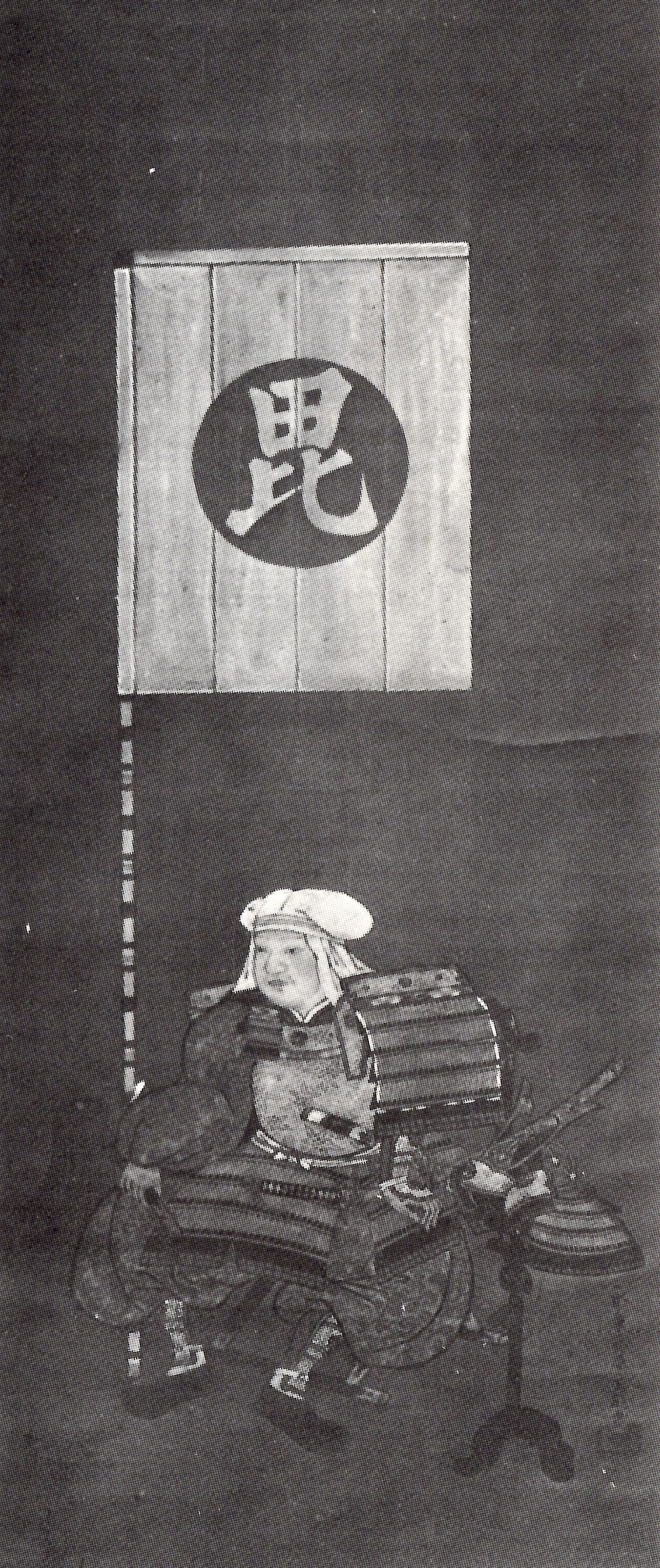 五島盛運とされる肖像。